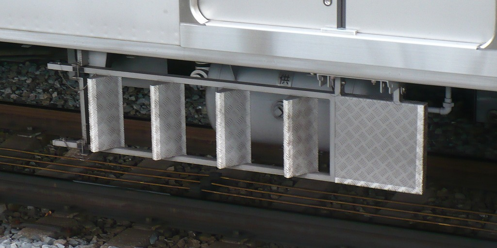 小田急4000形非常ハシゴ